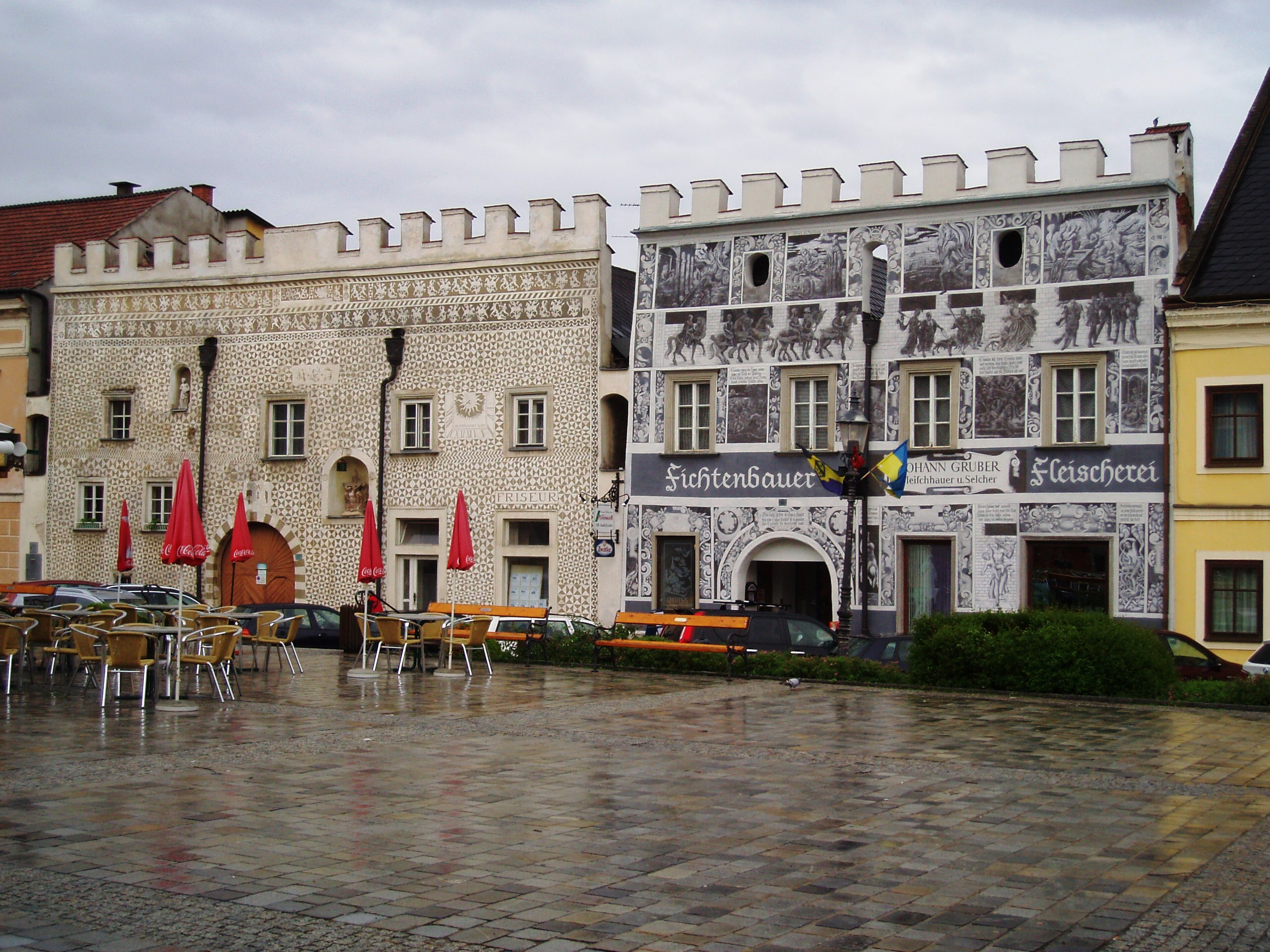 Sgrafiti na náměstí